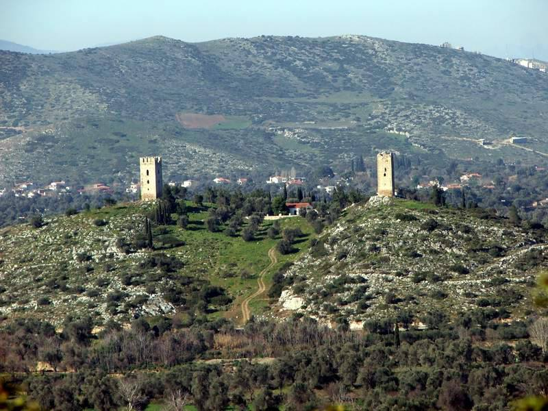 2 Πυργοι , Μύτικας Ευβοιας